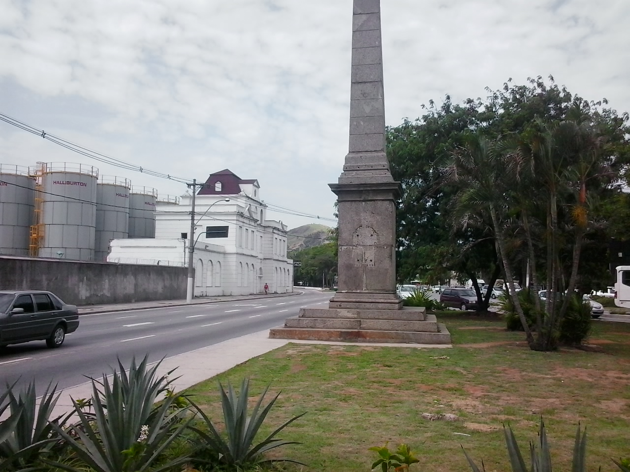 Trecho da Praça Renascença Fluminense, zona portuária, Centro, Niterói.